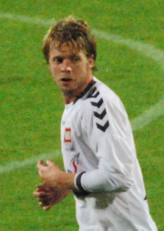 Fodboldspilleren Mikael Rynell fra Vejle-Kolding. Her i 1. divisionskampen imellem Viborg FF og Vejle-Kolding på Viborg Stadion.